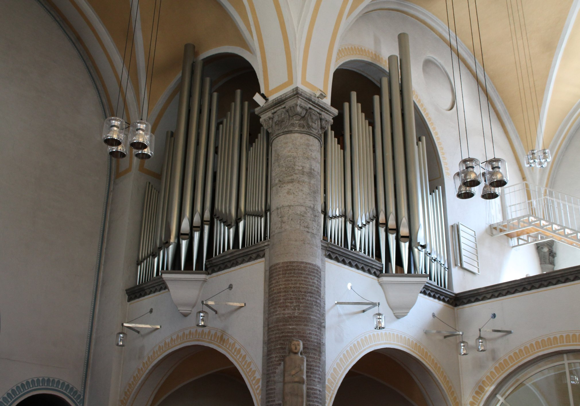 Orgel von St. Johannes in München (1957 Steinmeyer, III/33)